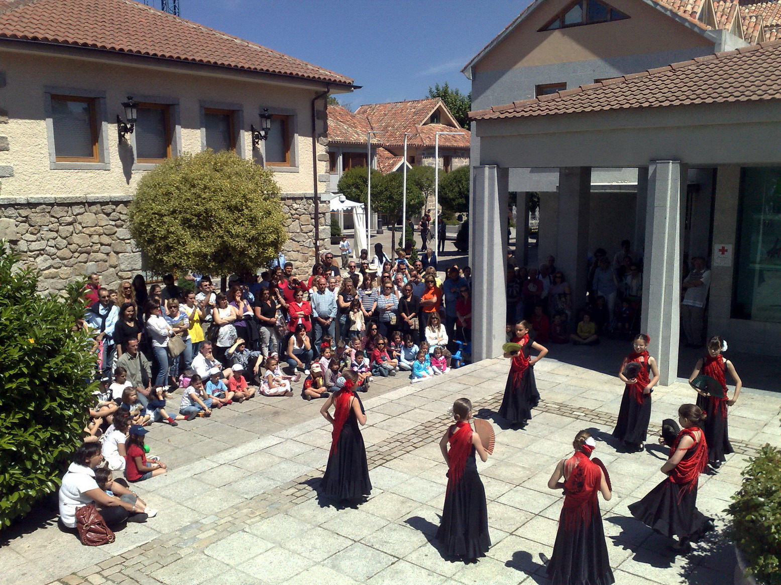 Torrelodones. Actuación de danza de la Escuela Municipal de Música y Danza "Antonio García Abril".